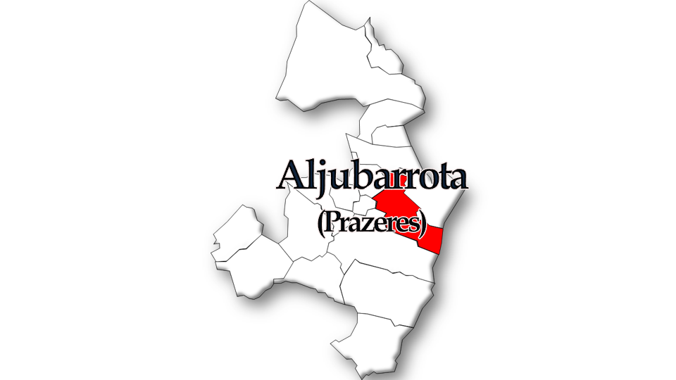 População